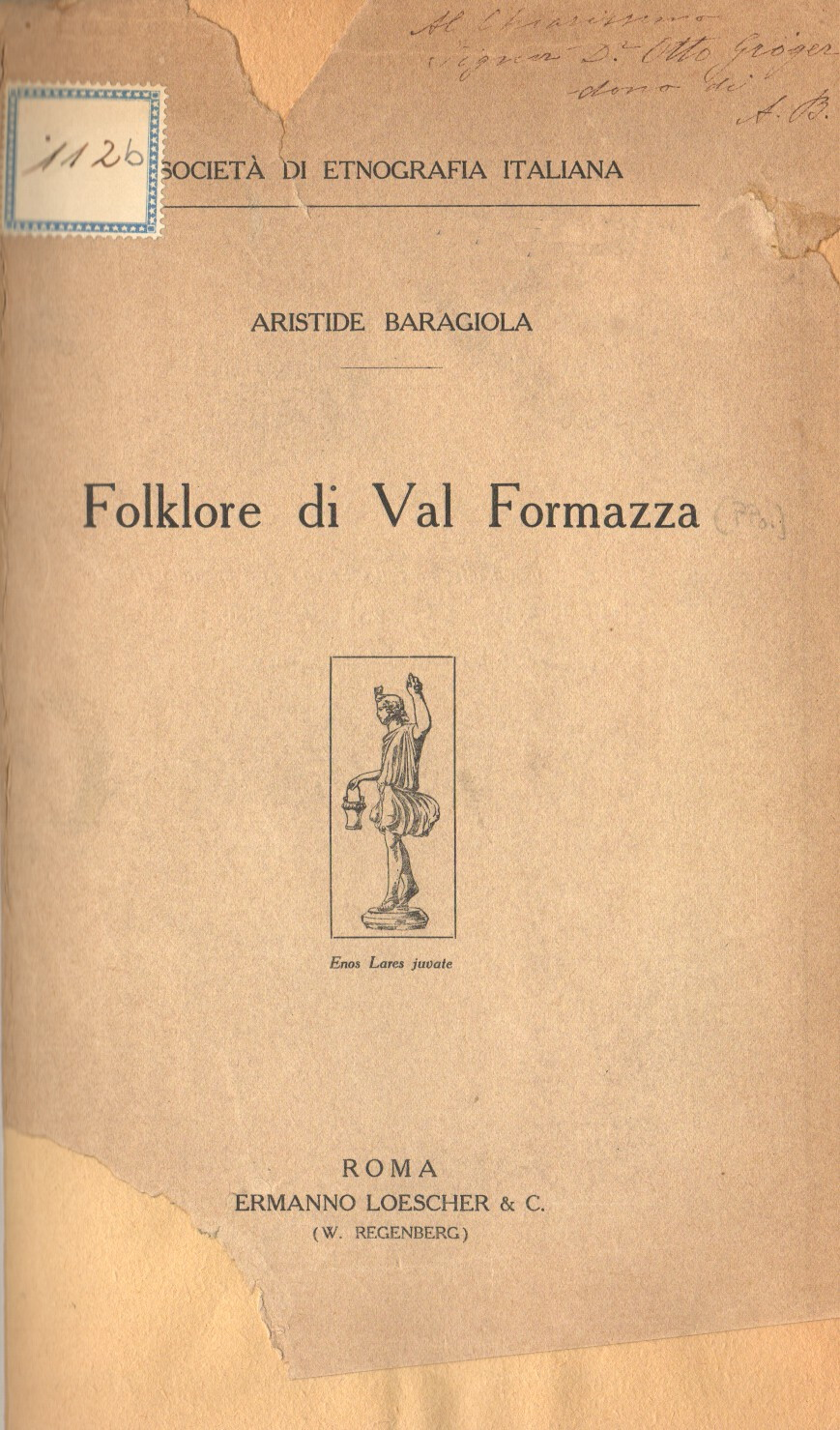 Titelblatt des Buches «Folklore di Val Formazza» von Aristide Baragiola, 1914